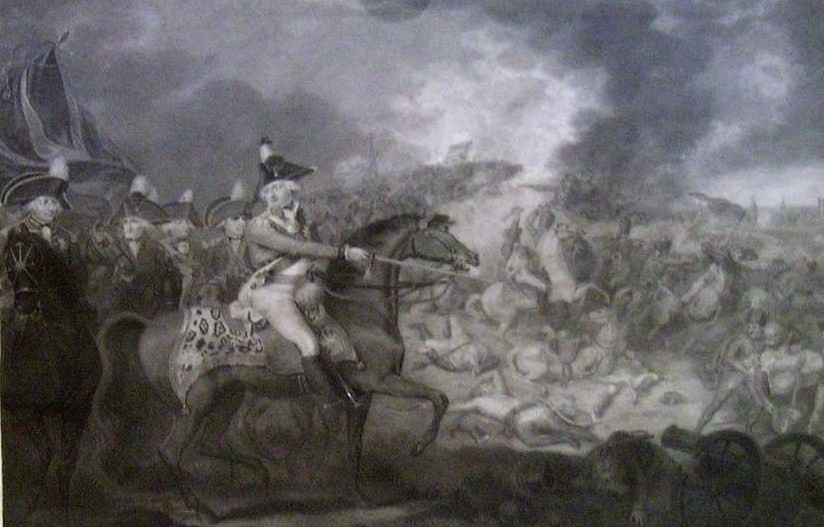 Bataille de Famars, livrée le 25 mai 1793 entre les troupes coalisées britanniques, hanovriennes et autrichiennes d'une part et l'armée française d'autre part. Gravure de Brown.